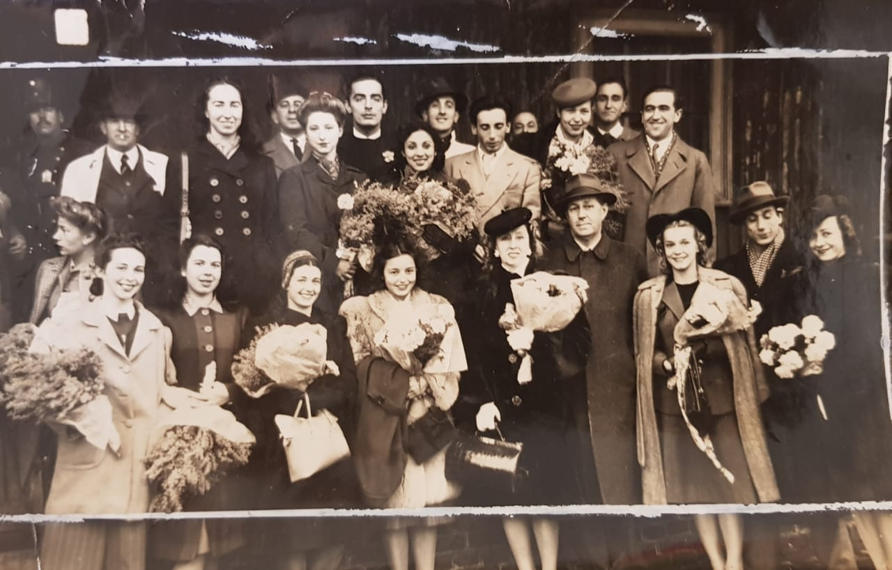 Bailarinos do Ballet Russe em 1944